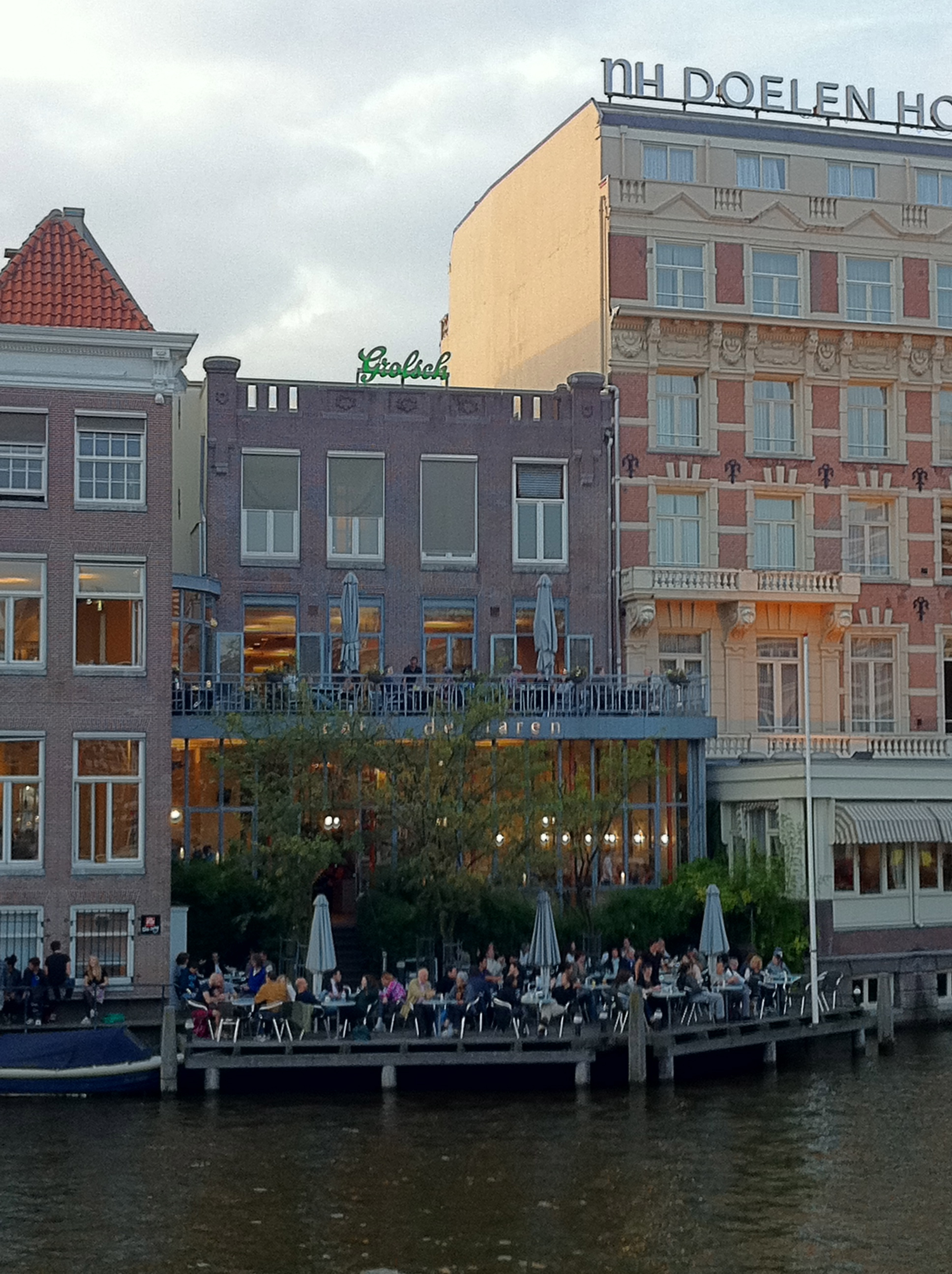 Amsterdam - Cafe De Jaren, Nieuwe Doelenstraat 20